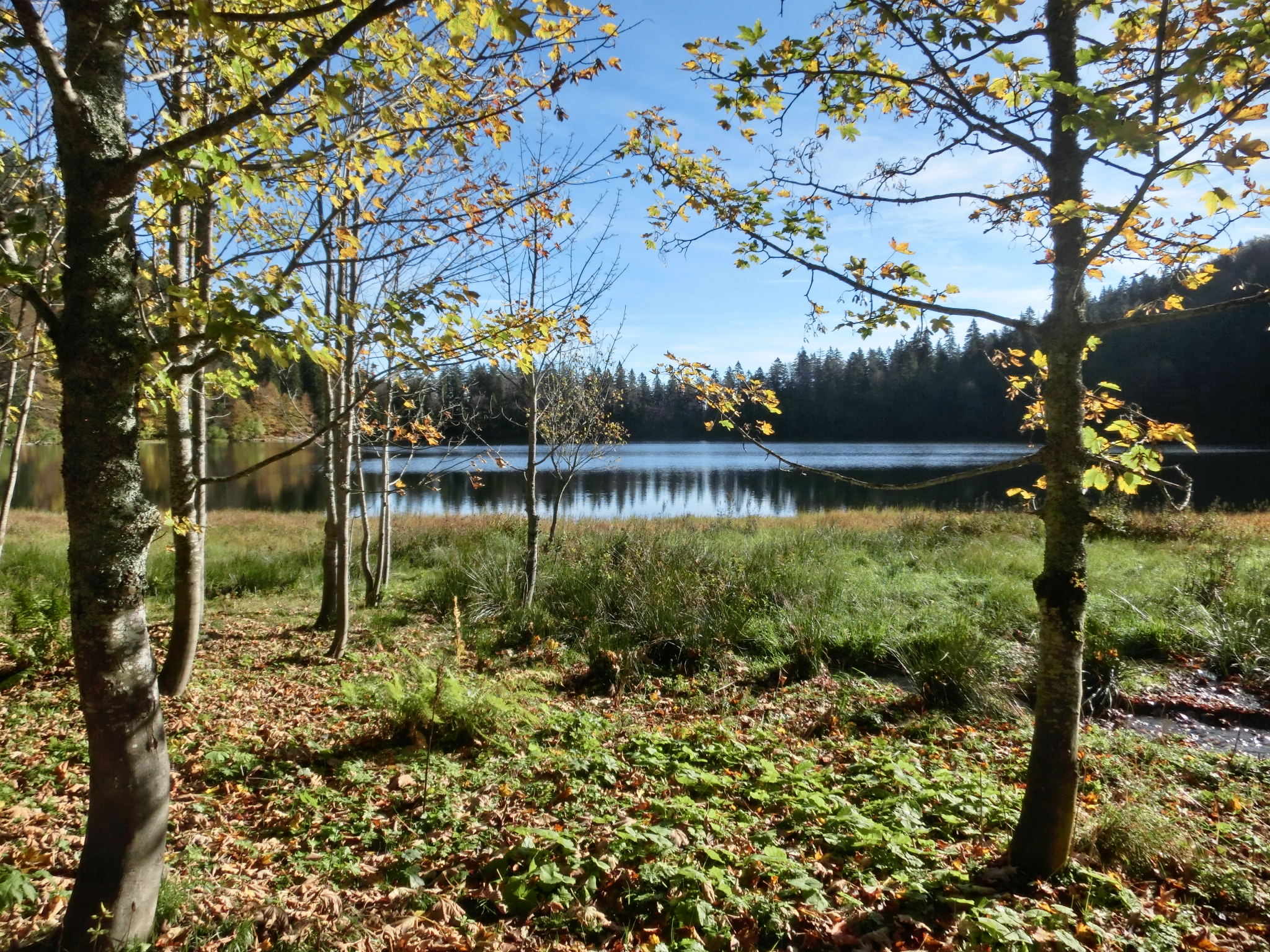 Deutschland (D) - Baden-Württemberg (BW) - Landkreis Breisgau-Hochschwarzwald (FR) - Gemeinde Feldberg: Feldsee